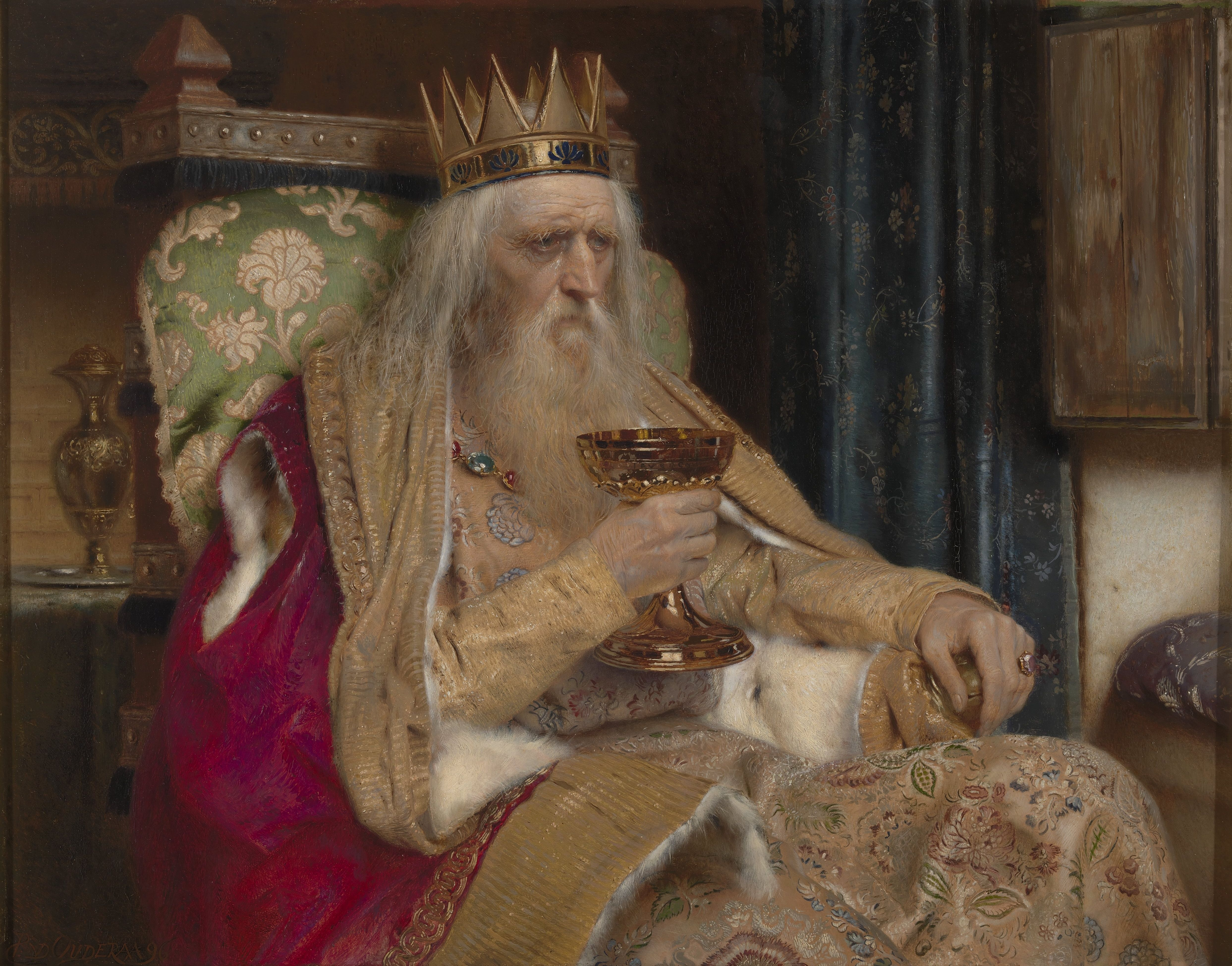 Le roi de Thulé